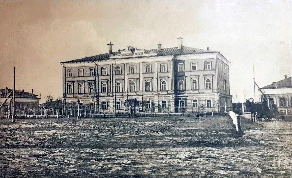 Казанский ветеринарный институт (1873—1918) - высшее учебное заведение Российской империи.